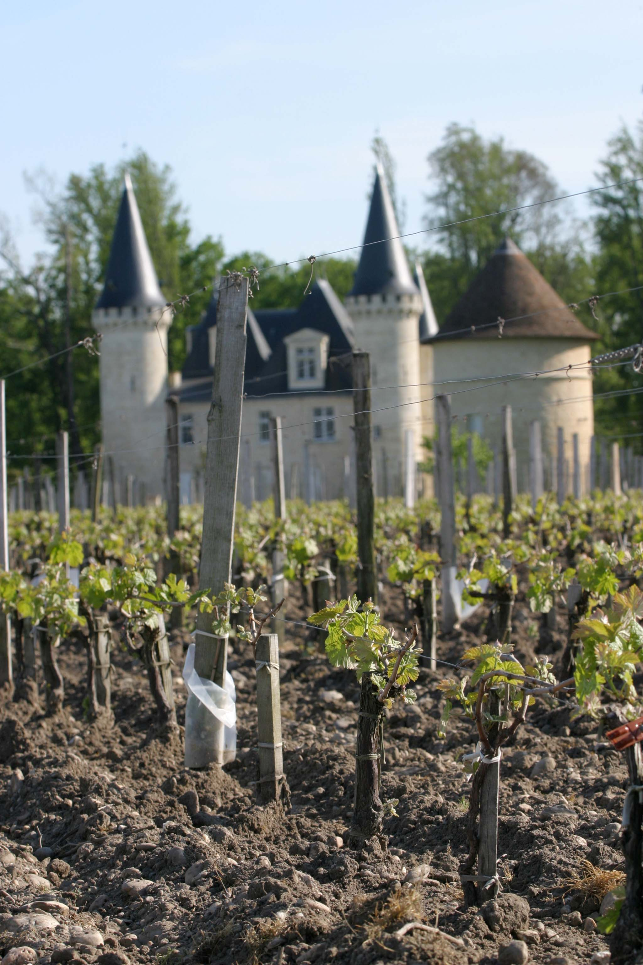 Château d'Agassac débourement des vignes